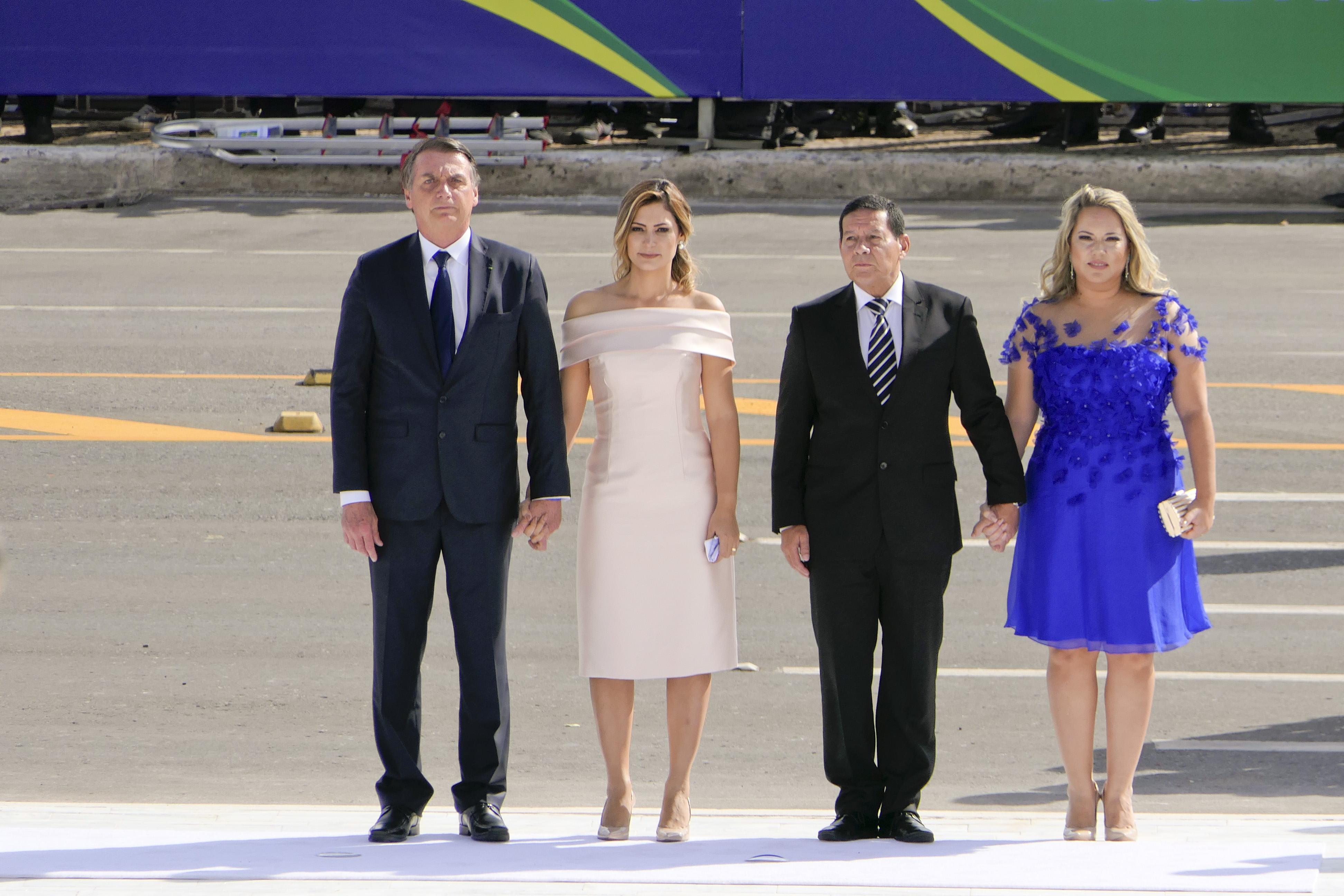 Solenidade de posse do presidente da República e do vice-presidente eleitos. Participam: presidente da República, Jair Bolsonaro; primeira-dama, Michelle Bolsonaro; vice-presidente da República, general Hamilton Mourão; esposa do vice-presidente da República eleito, Paula Mourão. Foto: Roque de Sá/Agência Senado